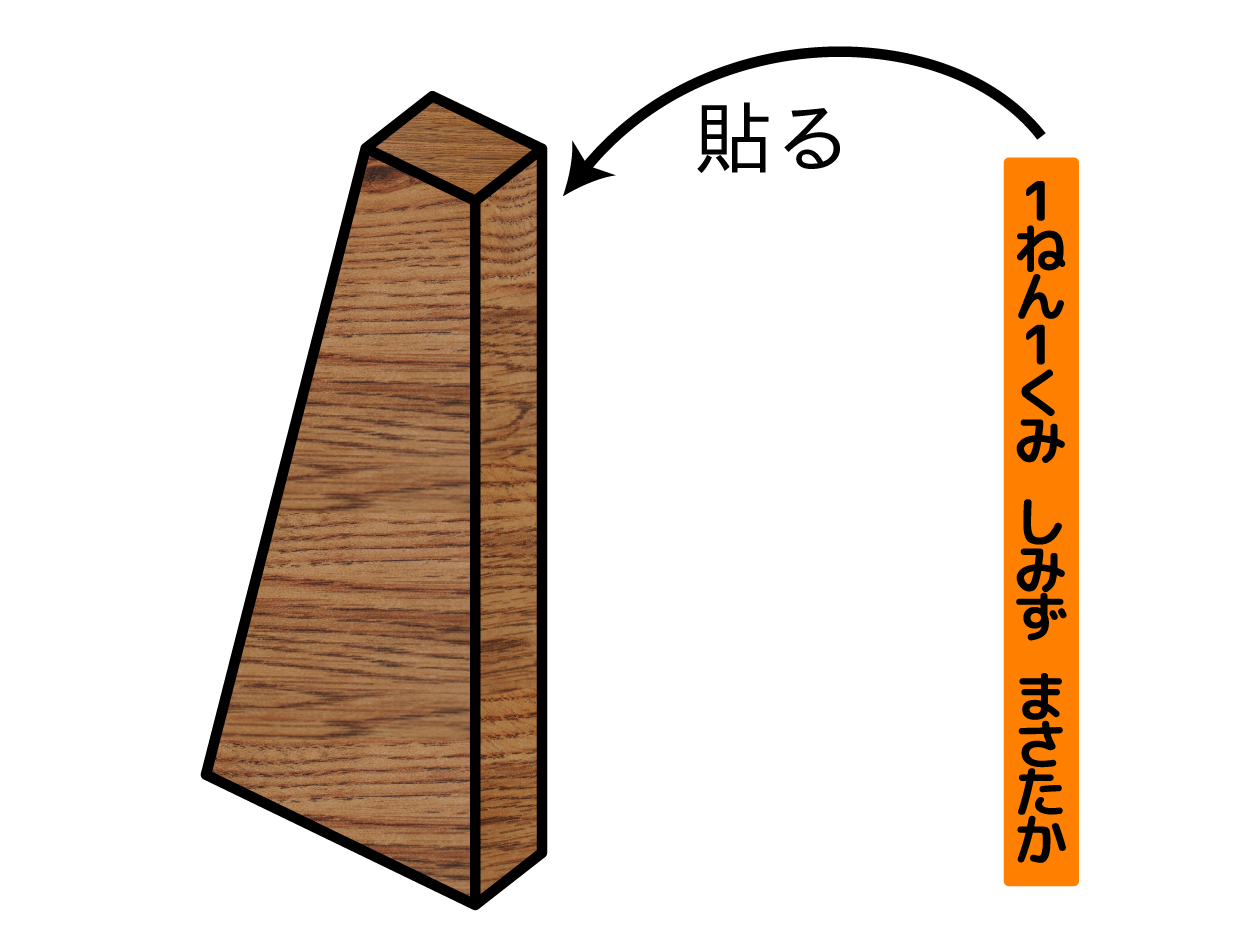 日本の学校図書館における代本板のイメージ。登場する人物・団体・名称等は架空であり、実在のものとは関係ありません。